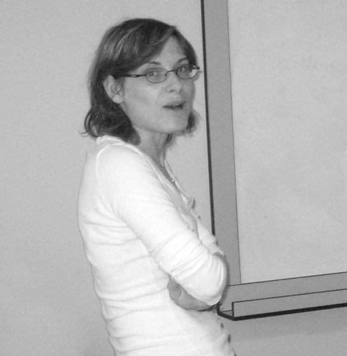 Déborah Heissler, Université Naresuan de Phitsanulok, Thaïlande (juillet 2010).